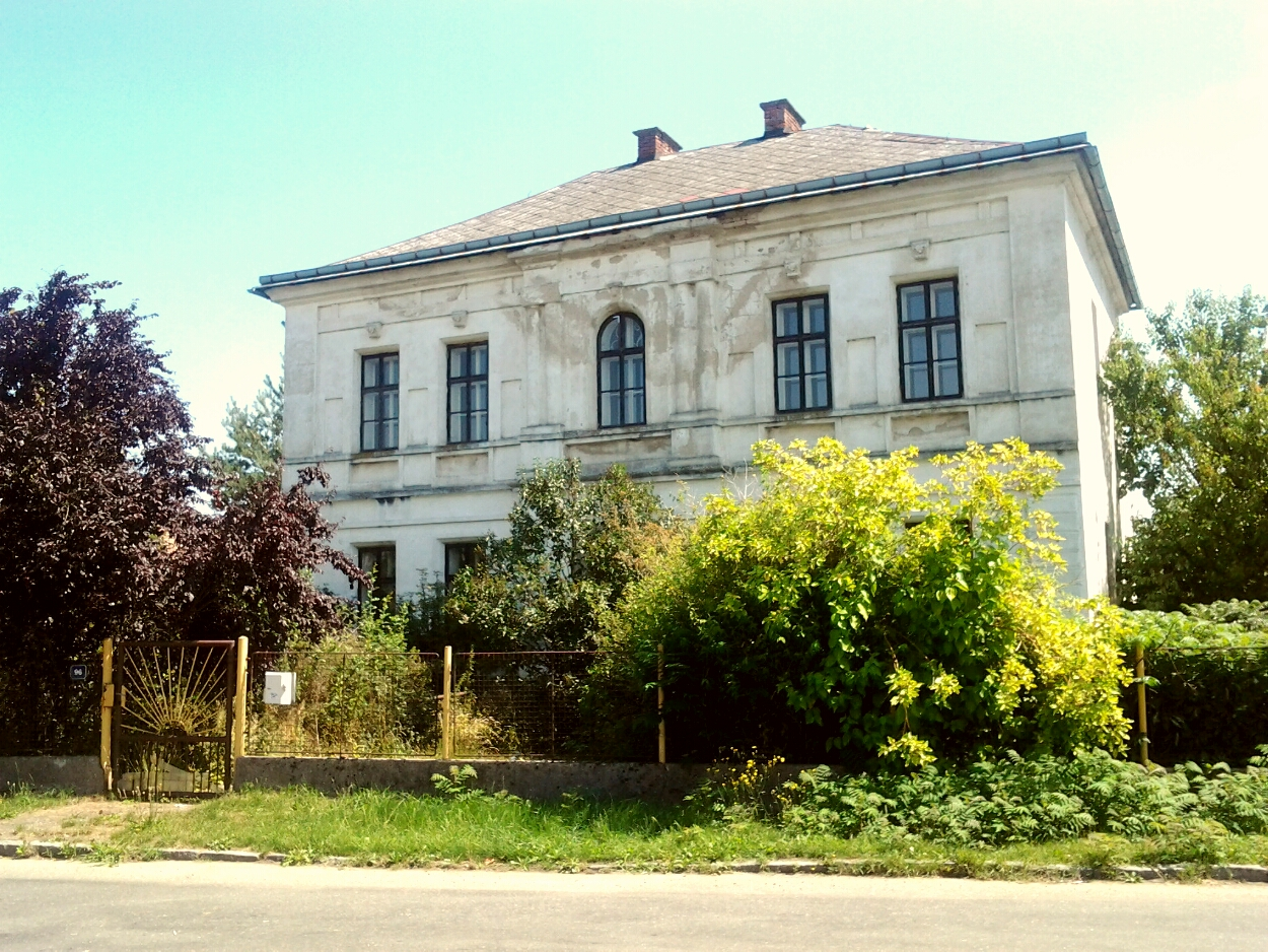 Zámeček Staré Ždánice (léto)